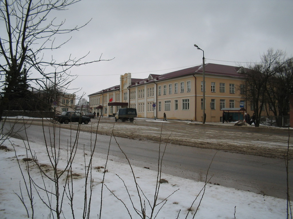 Здание городской администрации